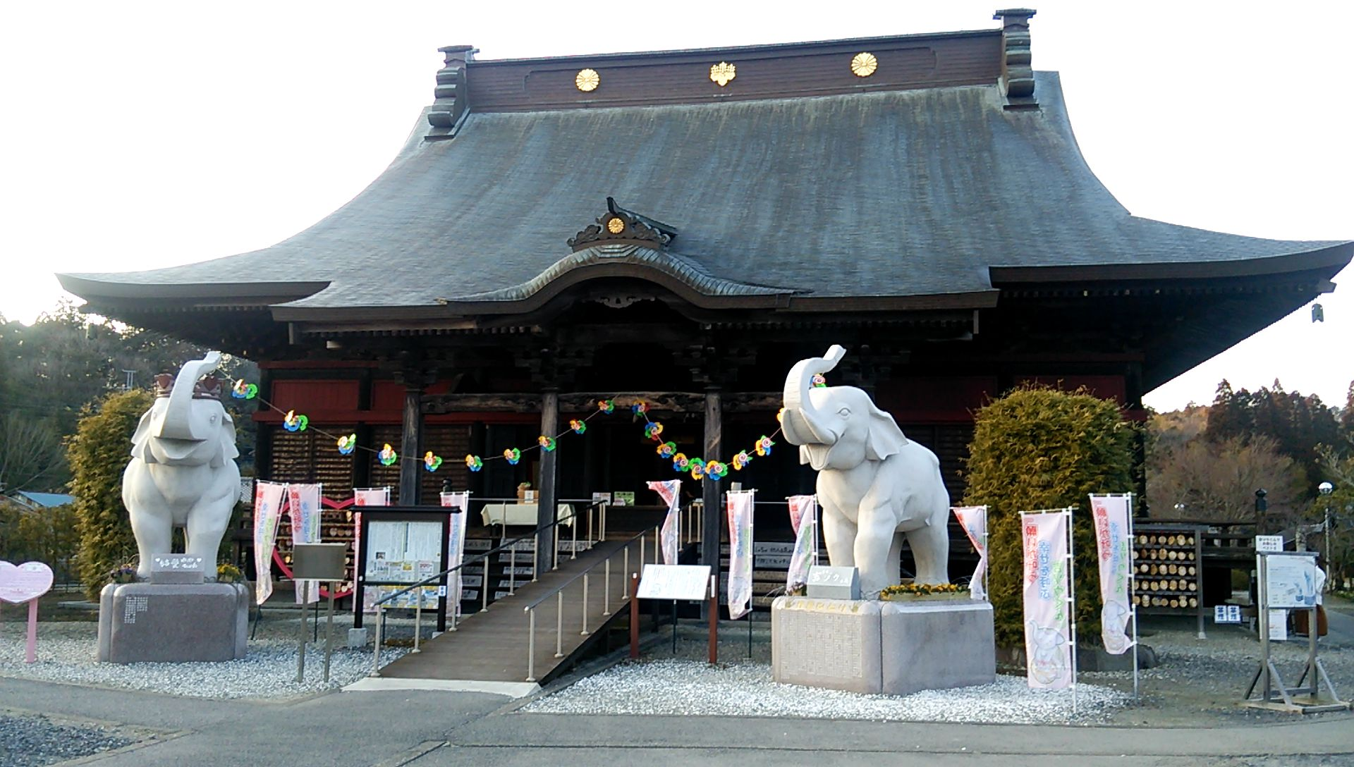 長福寿寺 外観